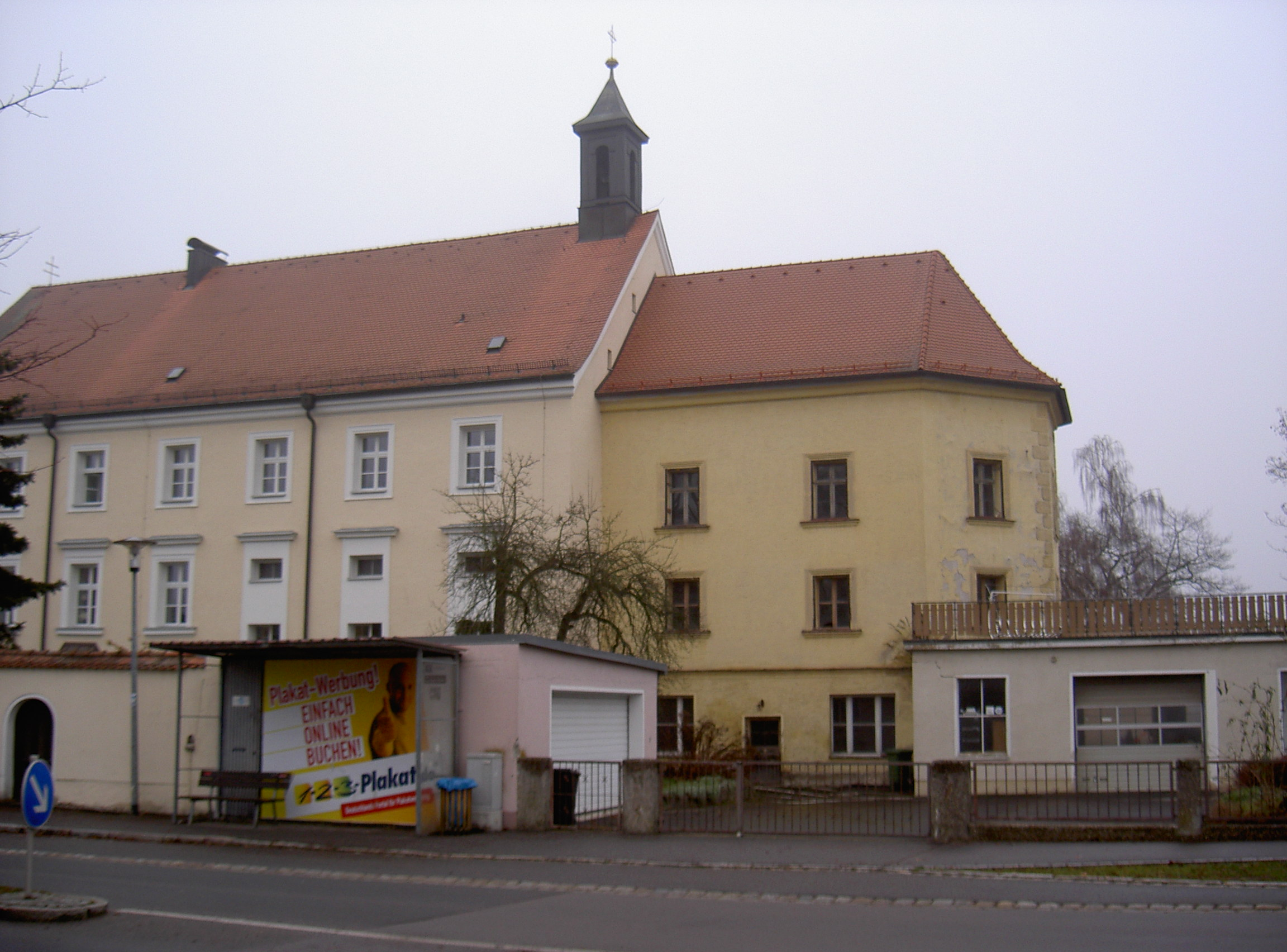 Neunburg vorm Wald, Gerhardinger Straße 7